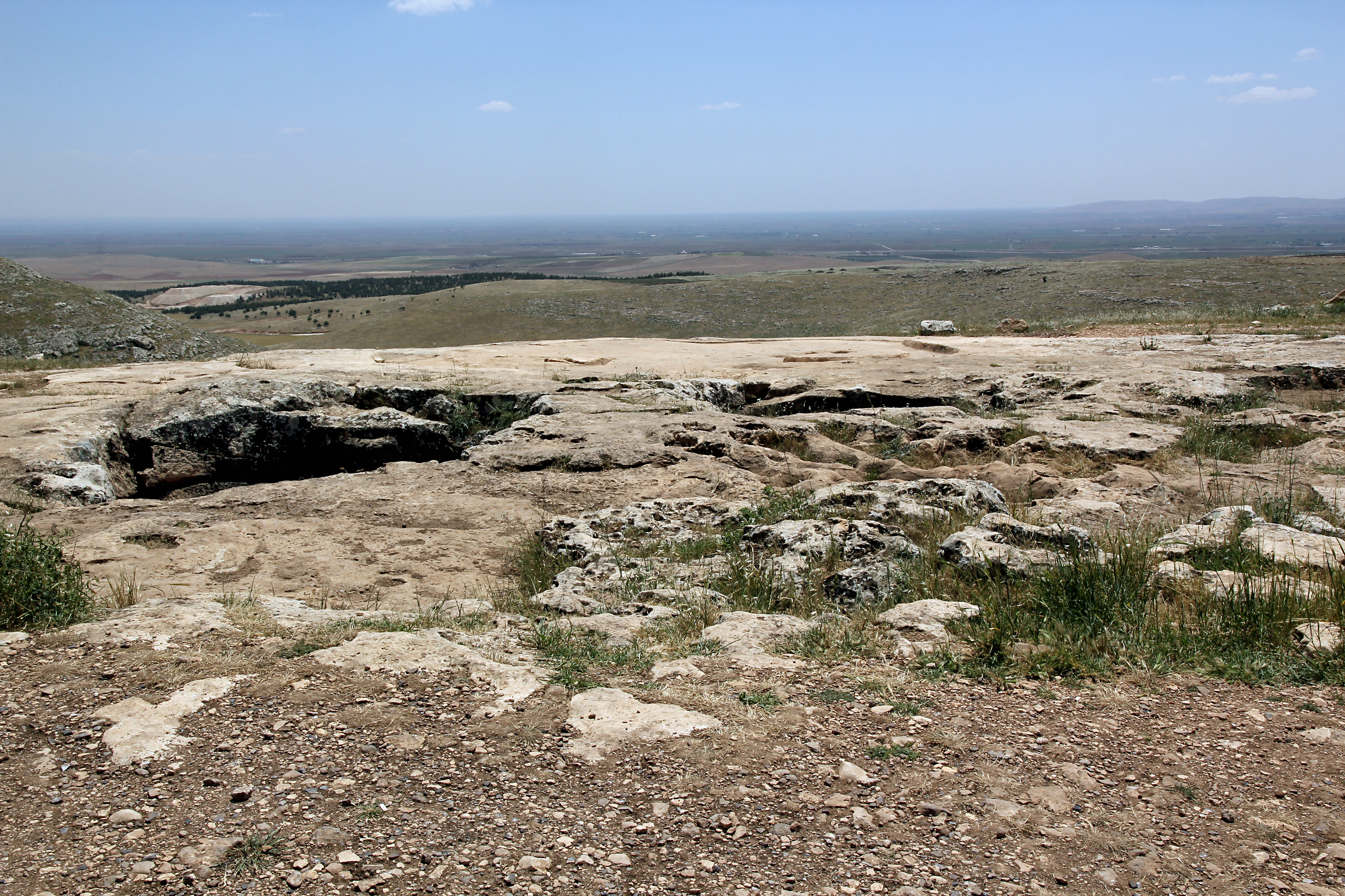 Göbekli Tepe, Siedlungshügel bei Şanlıurfa, Südosttürkei, Anlage E genannt "Felsentempel"